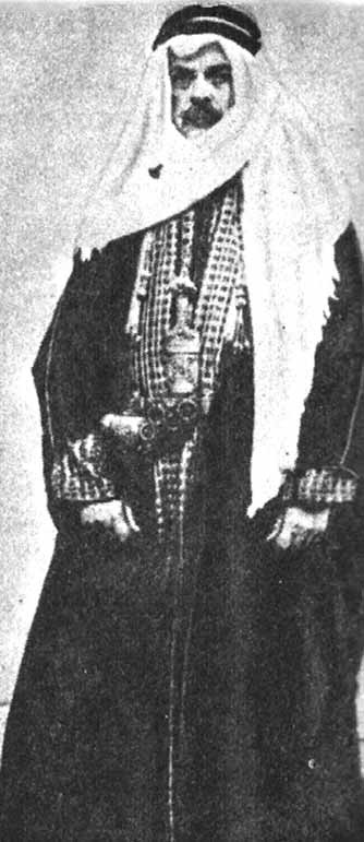 Bogdan von Zientarski (1884 bis 1958) war von 1927 bis 1944 Leiter des Gestütes Gumniska (gegründet 1853) bei Roman Fürst Sanguszko.